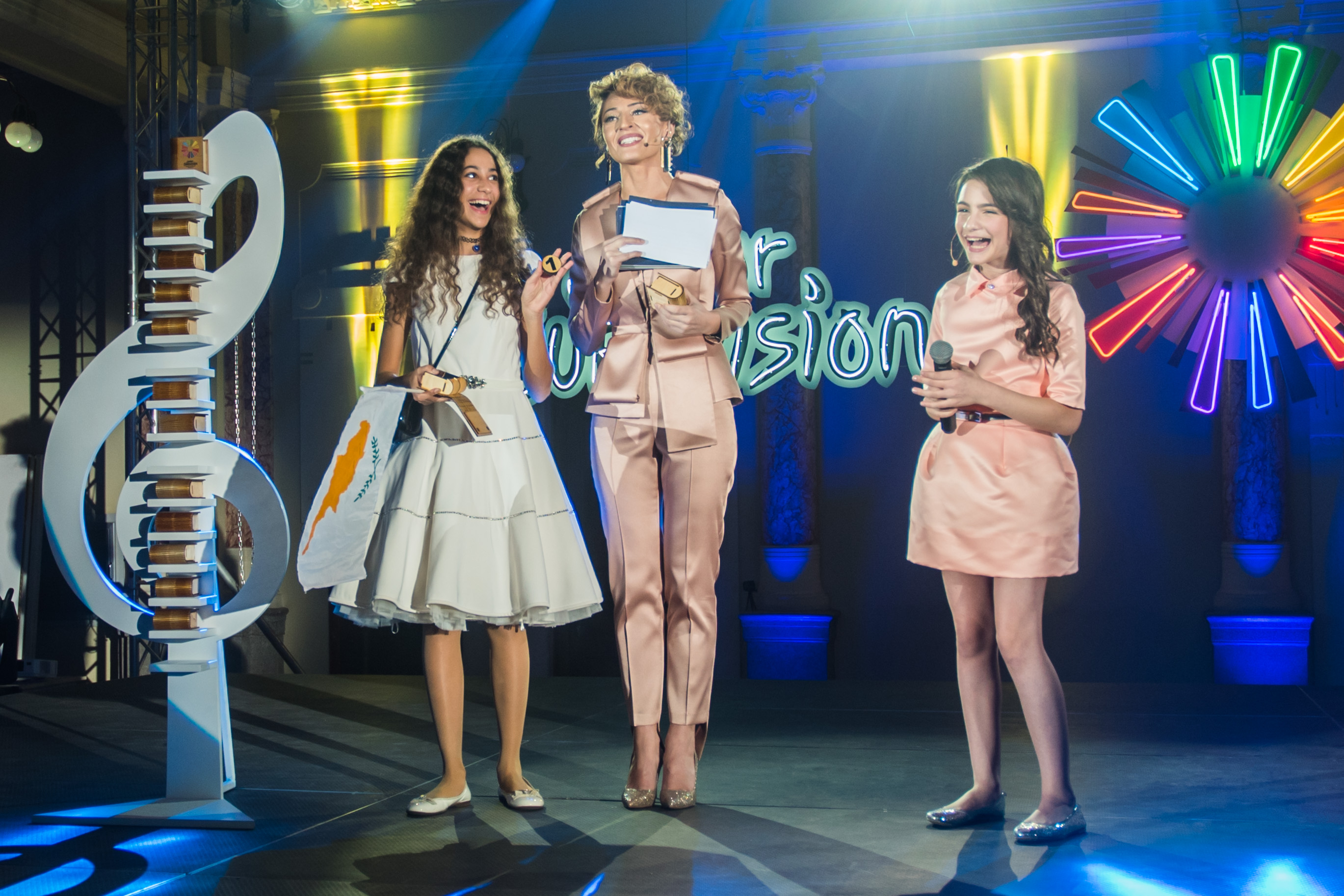 Представительница Кипра откроет Детское Евровидение 2017